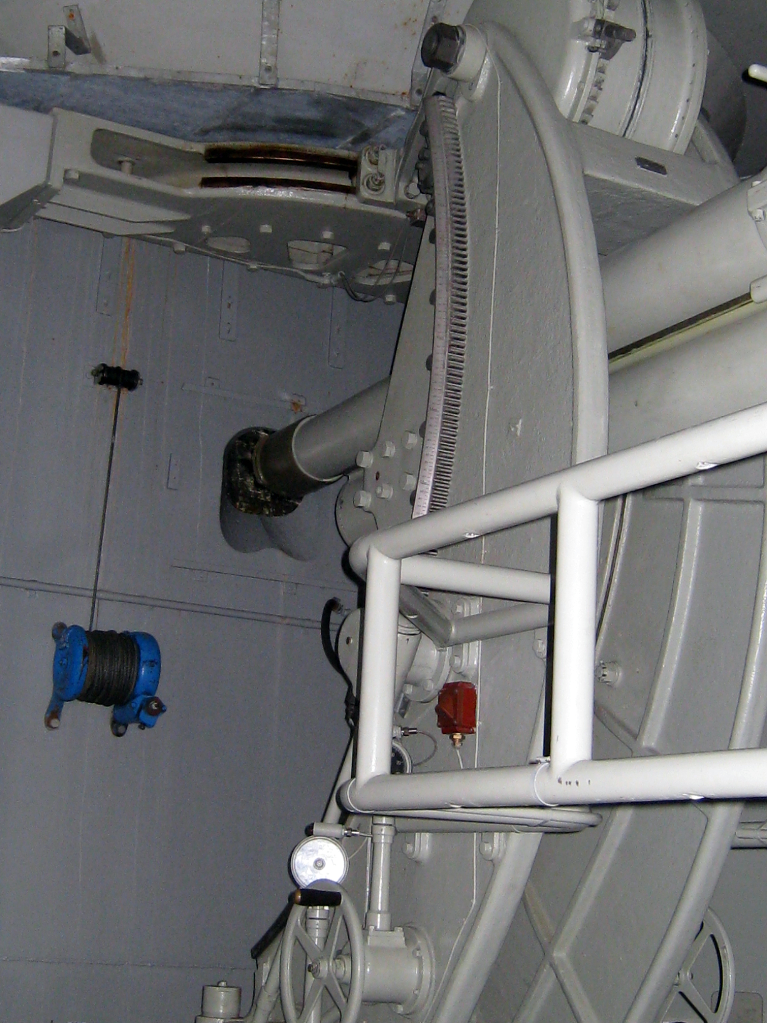 Festungsmuseum Crestawald, 10.5 cm Fest Kan 39 L42 "Silvia"